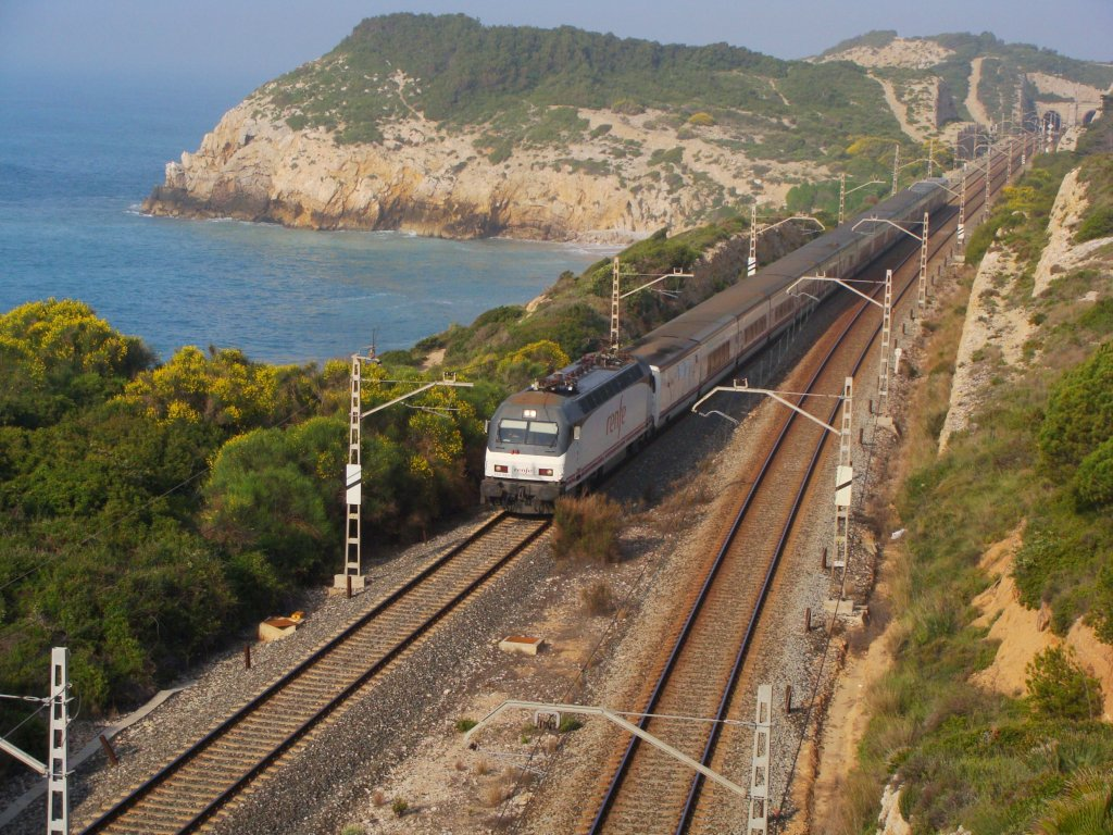 La locomotora 252.064 amb el Trenhotel Alhambra Granada - Barcelona Sants en direcció aquest última població al seu pas per Vilanova i la Geltrú.